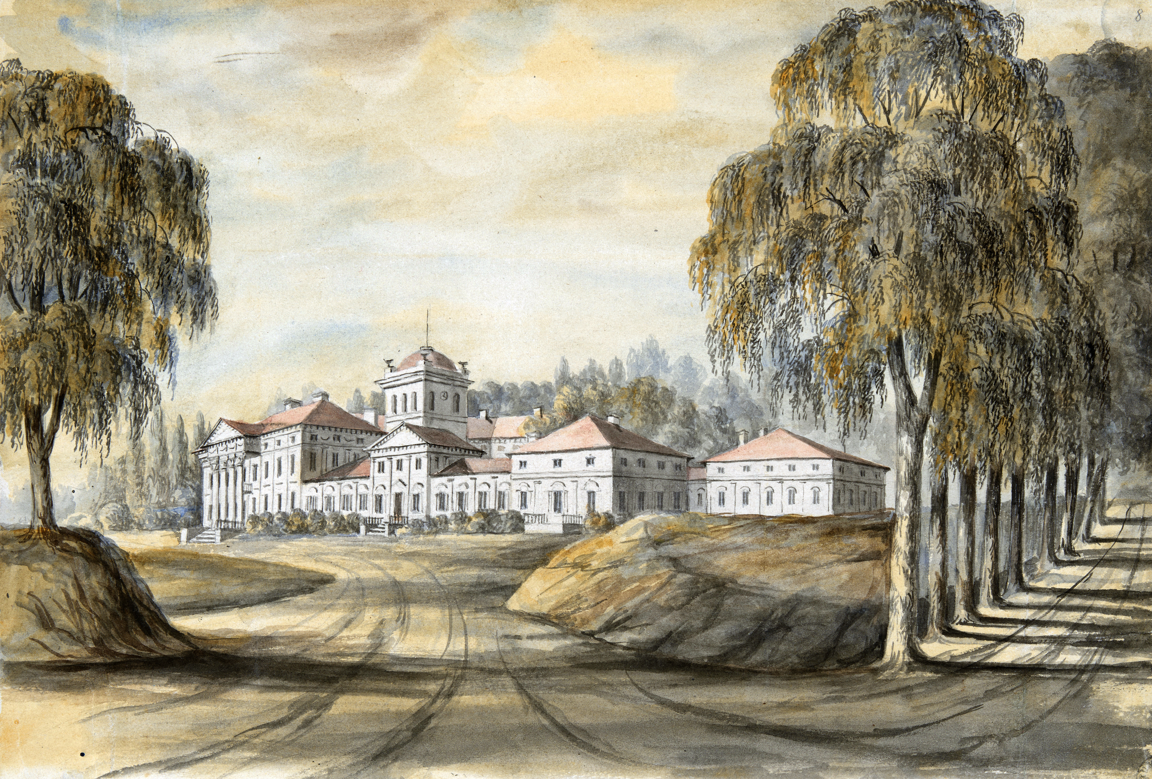 Беларуская (тарашкевіца): Добасна (Dobasna), сядзіба Булгакаў (Bułhak)